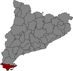 Comarca litoral catalana, situada entre el Mataranya (N-O), el Baix Ebre (N), el Maestrat (S-E), i els Ports (S-O). Té 668 km^2 d'extensió. El relleu es caracteritza pel domini gairebé absolut de les planes ; el sector occidental és constituït per una àmplia plana decantada vers l'Ebre i encerclada per les muntanyes dels ports de Beseit, el riu de la Sènia i la serra del Montsià, mentre que el sector oriental forma part de les terres baixes al·luvials del delta del riu Ebre.